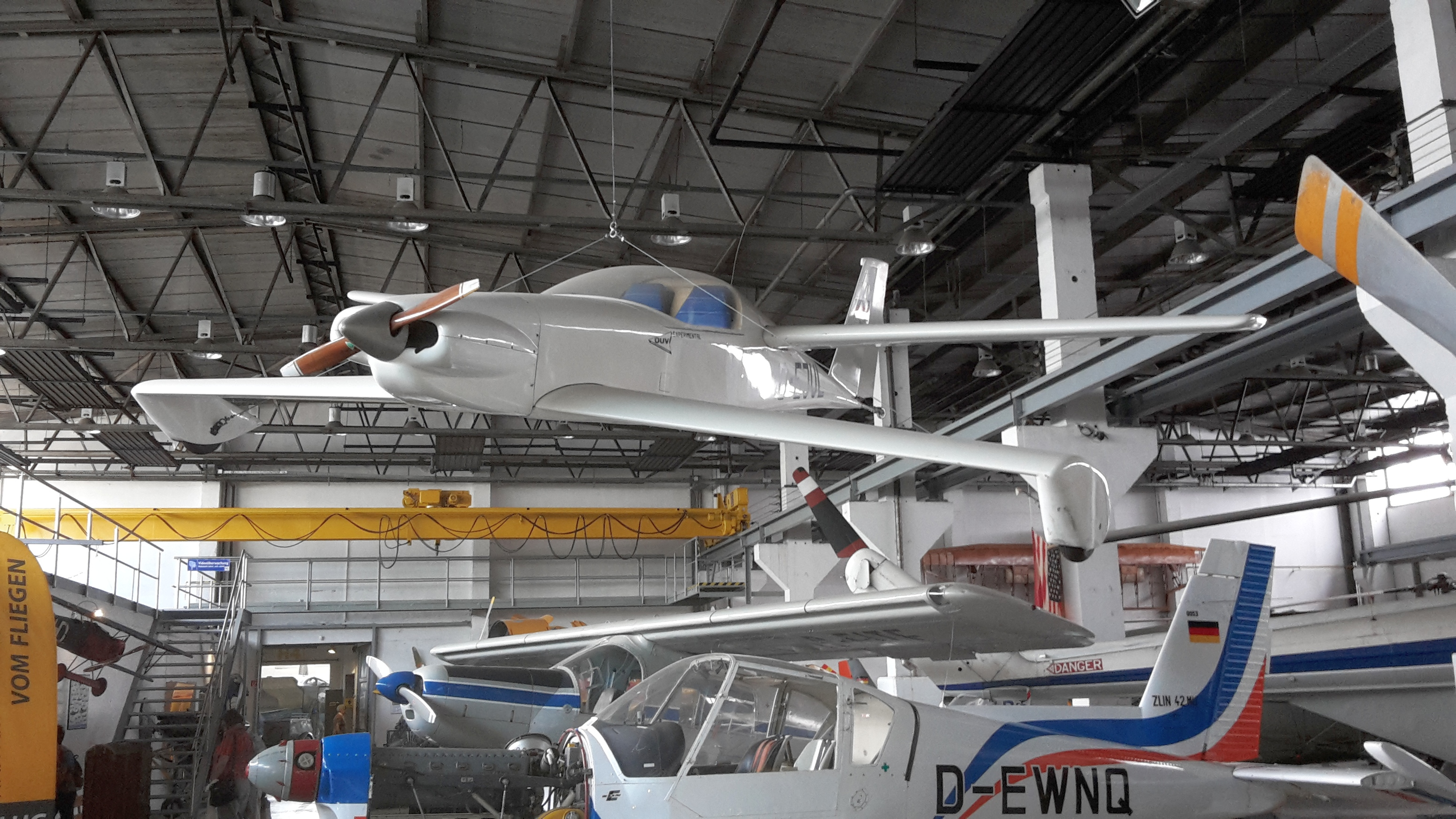 Viking Aircraft Dragonfly D-EJUL im Luftfahrtmuseum Wernigerode, Sachsen-Anhalt, Deutschland.